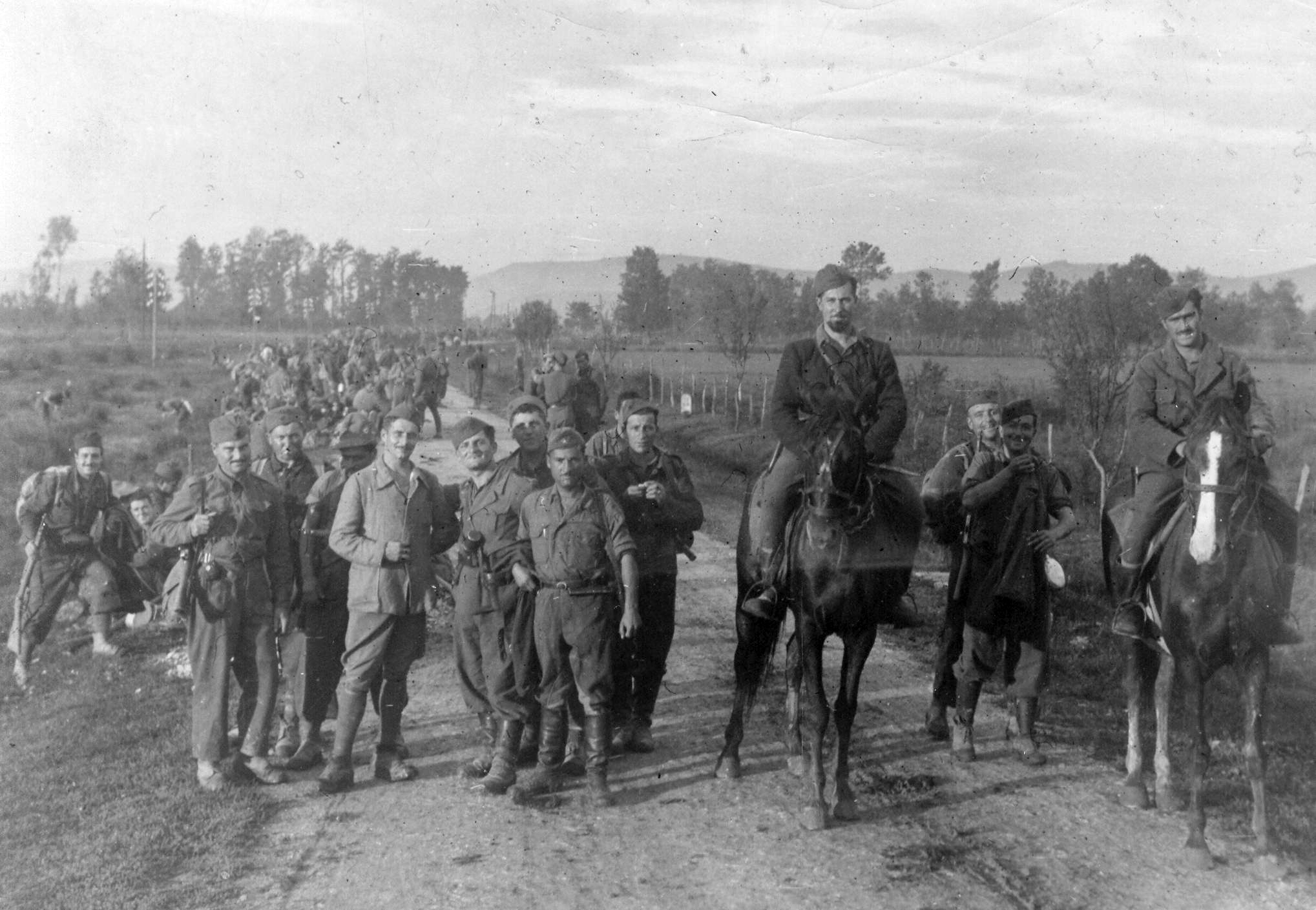 Srpskohrvatski / српскохрватски: Borci bataljona Garibaldi na putu prema Beogradu, u čijem su oslobađanju učestvovali oktobra 1944.